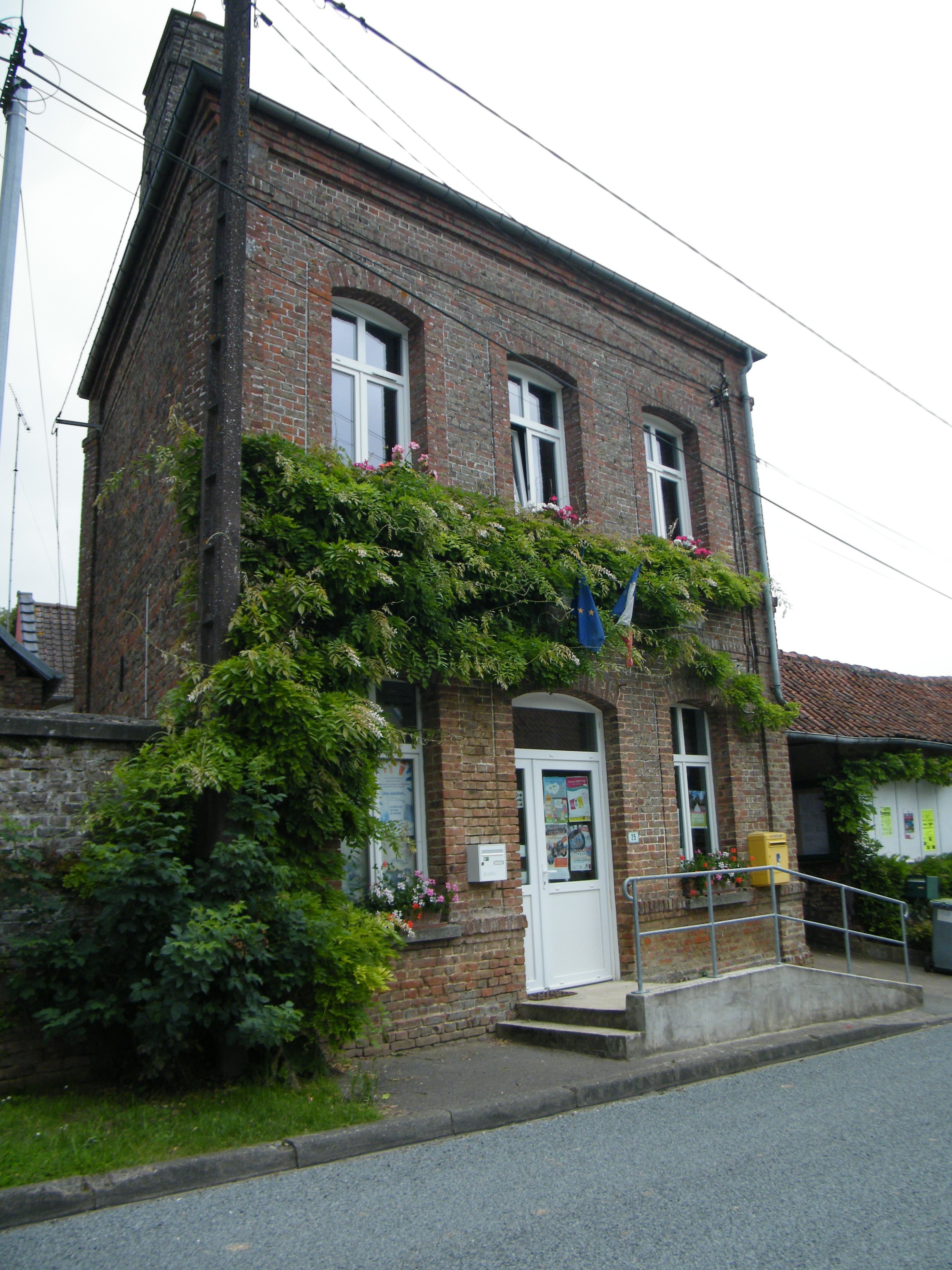 Mairie.